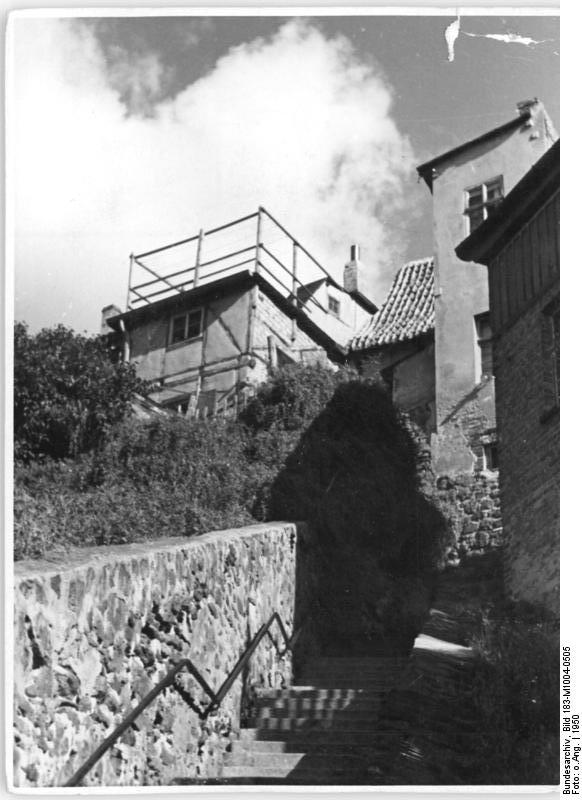 Quedlinburg, Münzenberg ADN-ZB Bez. Halle Der Münzenberg in Quedlinburg. Aufn. 1950 Provinzstädtchen Münzenberg gehört zu Quedlinbburg